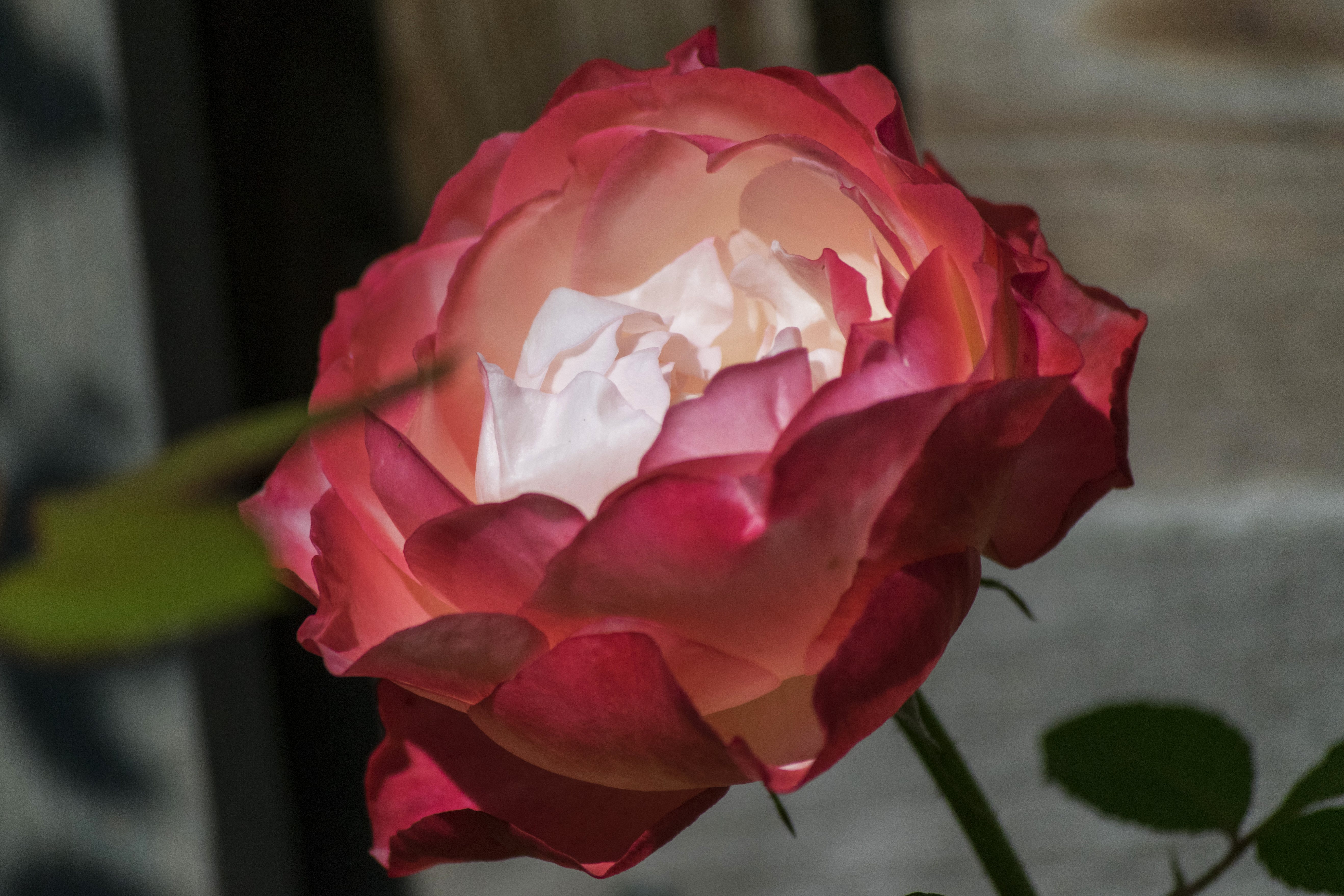 Roze theeroos